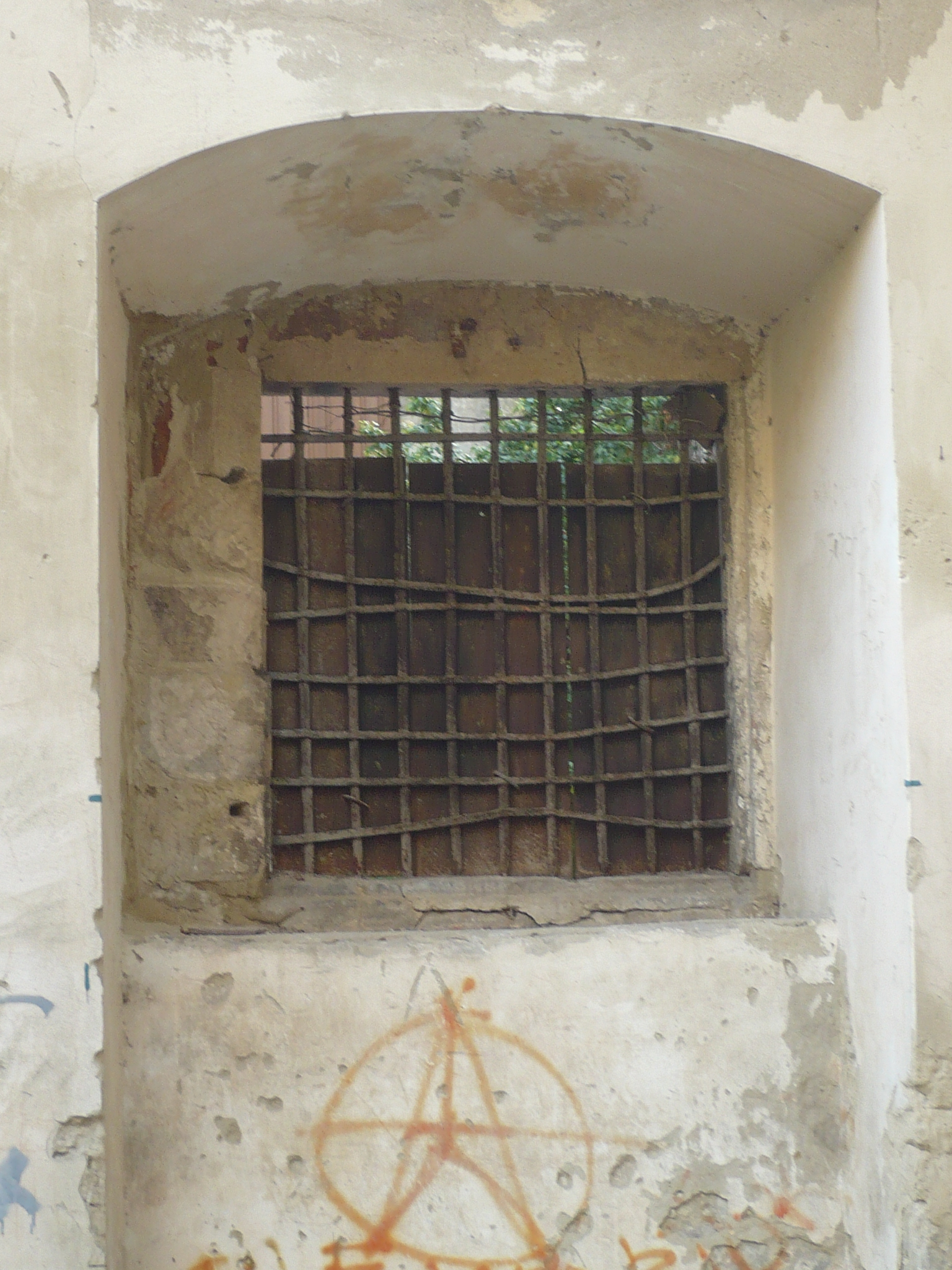 Lwów. Synagoga Złota Roża